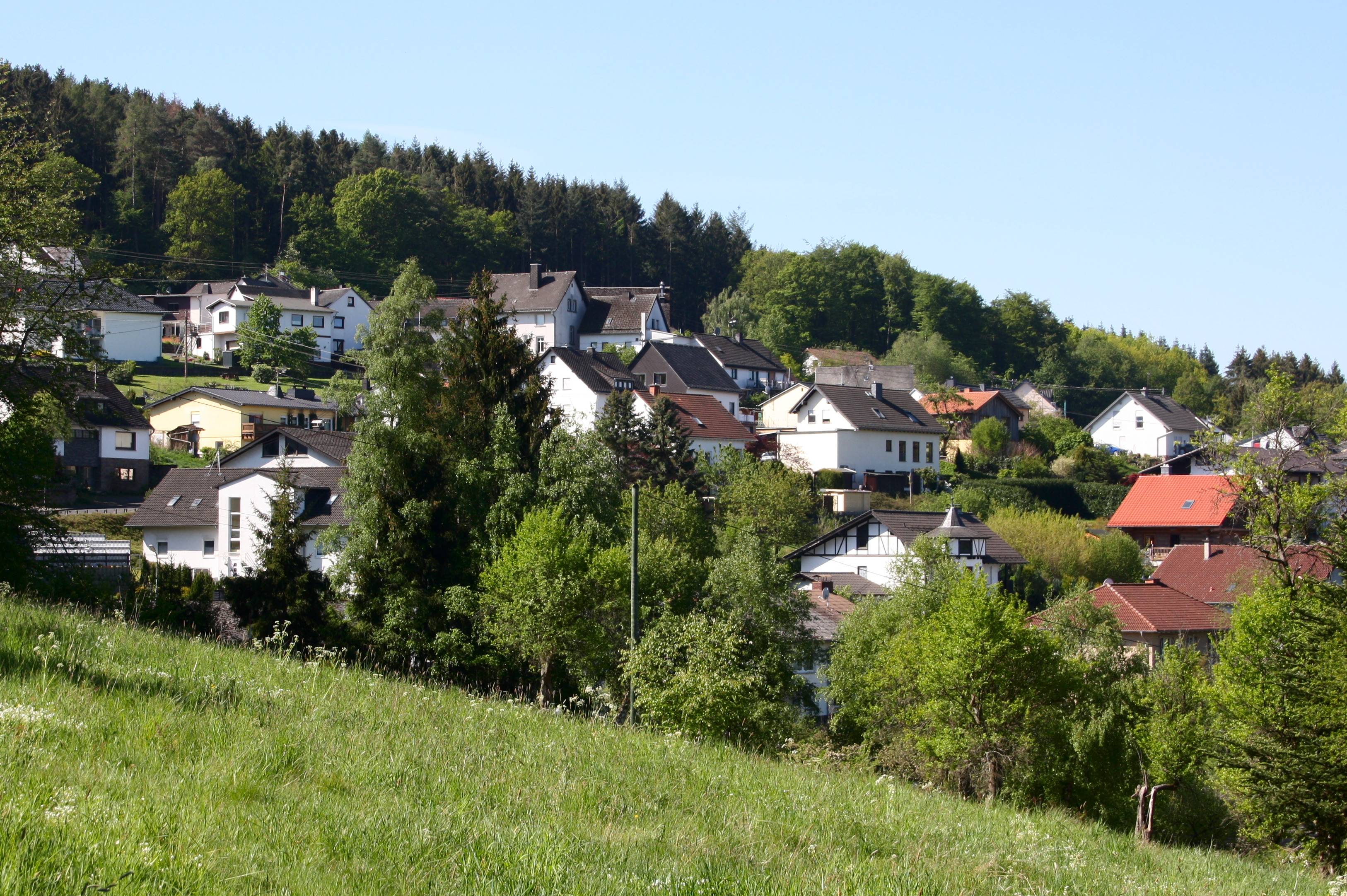 Kammerforst, Westerwald, Rheinland-Pfalz, Deutschland